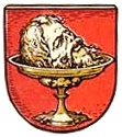 Herb Koszalina z ok. 1440-1800 z głową św. Jana na złotej paterze